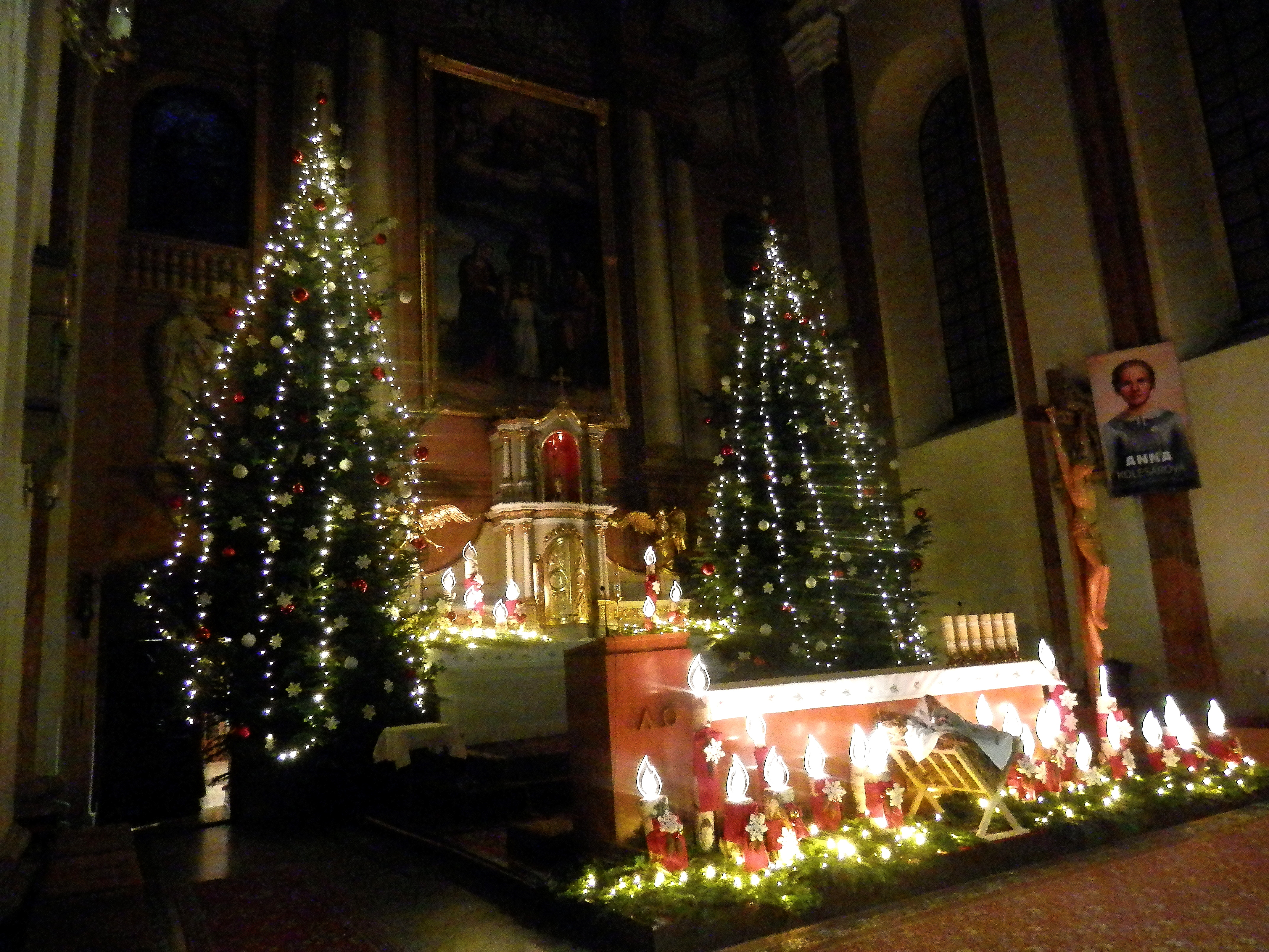 Nový rok 2019, vianočná výzdoba. Kostol sv. Jozefa Františkánske námestie,mesto Prešov, Slovensko.